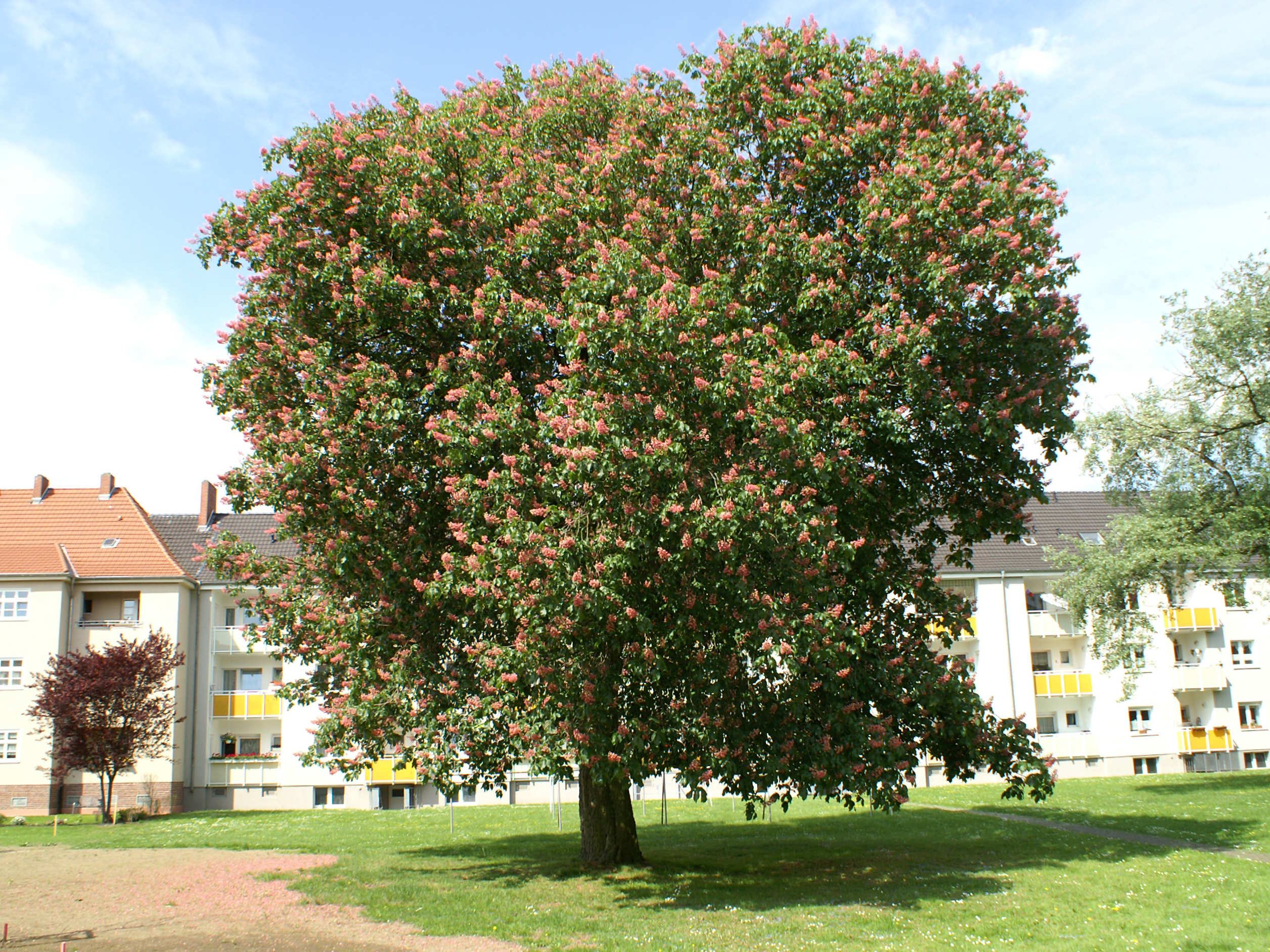 Rotblühende Rosskastanie im Hinterhof zwischen der Koburger- und Weimarer Straße in der Germaniasiedlung in Köln-Höhenberg